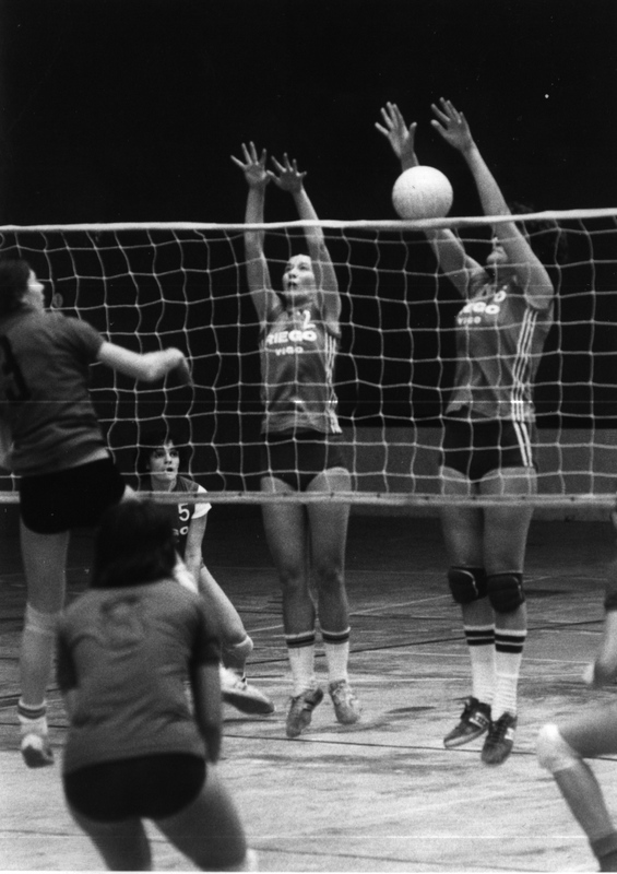 Bloquean Ana Novoa y Nenuca